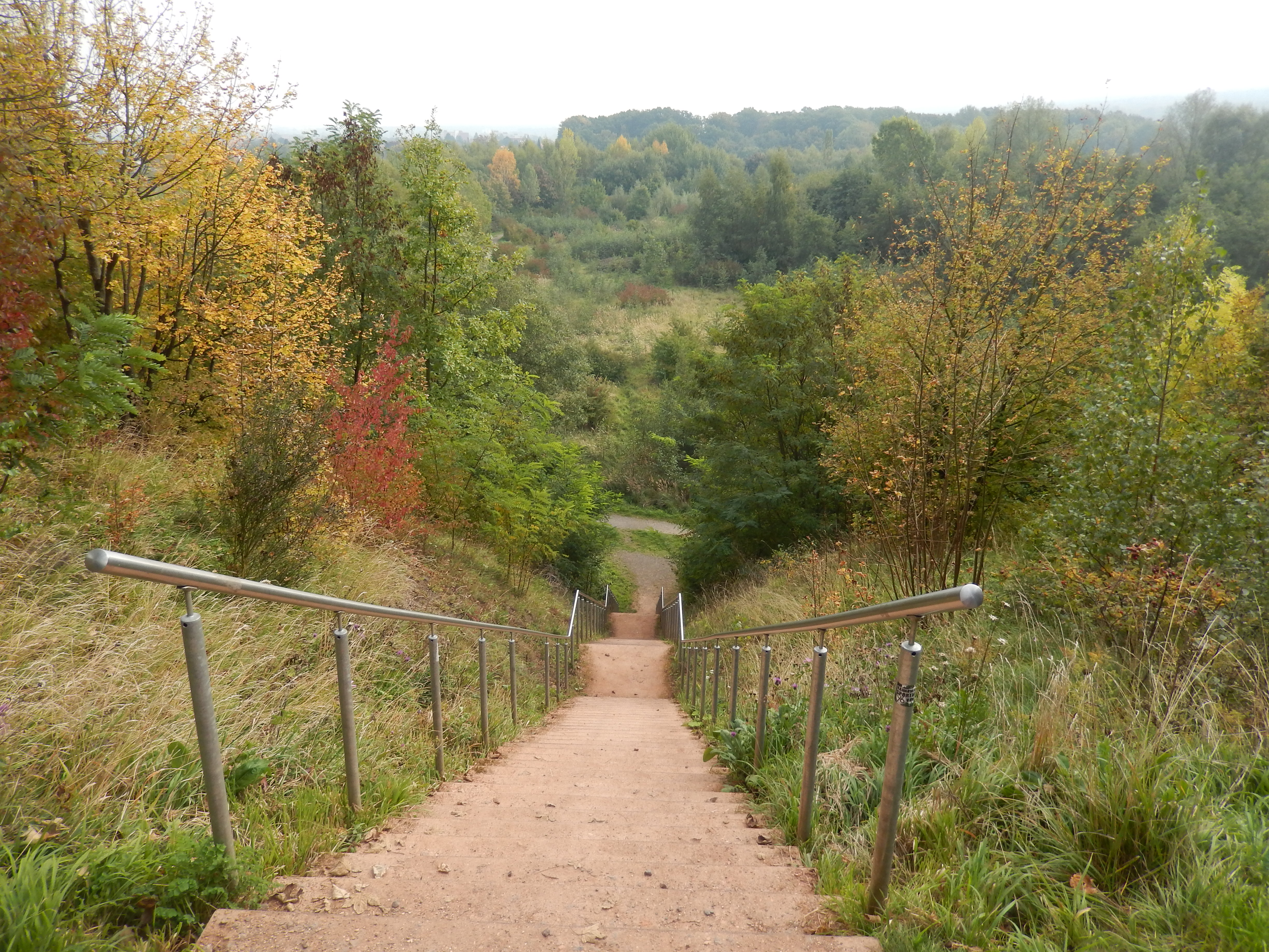 Treppe und Aussicht am Ostende der Halde in Barsinghausen im Herbst